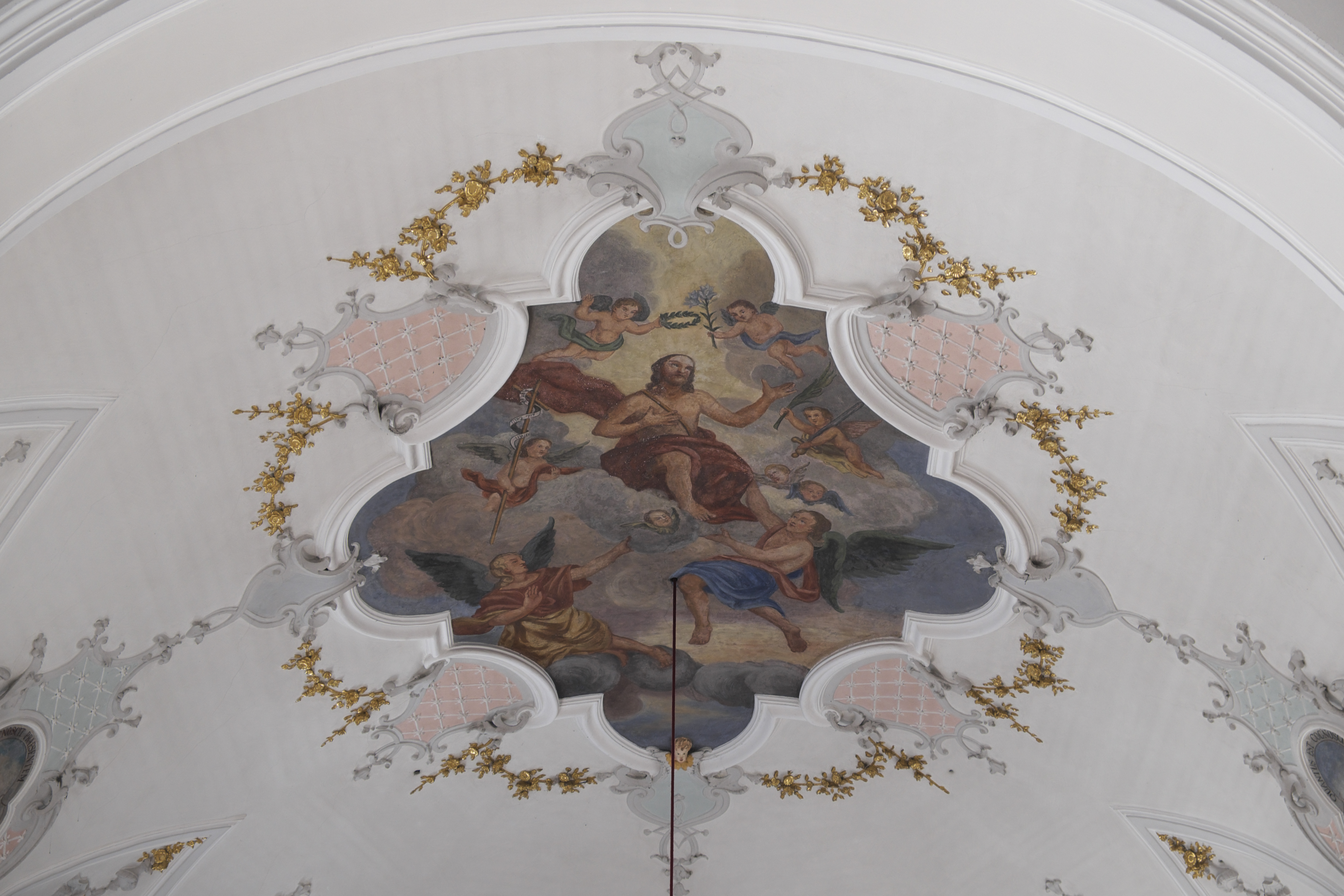 Katholische Pfarrkirche St. Johannes der Täufer in Stadl (Vilgertshofen) im oberbayerischen Landkreis Landsberg am Lech (Bayern/Deutschland), Fresken, vielleicht von Johann Baptist Baader, mehrmals übermalt, mit Szenen aus dem Leben Johannes des Täufers